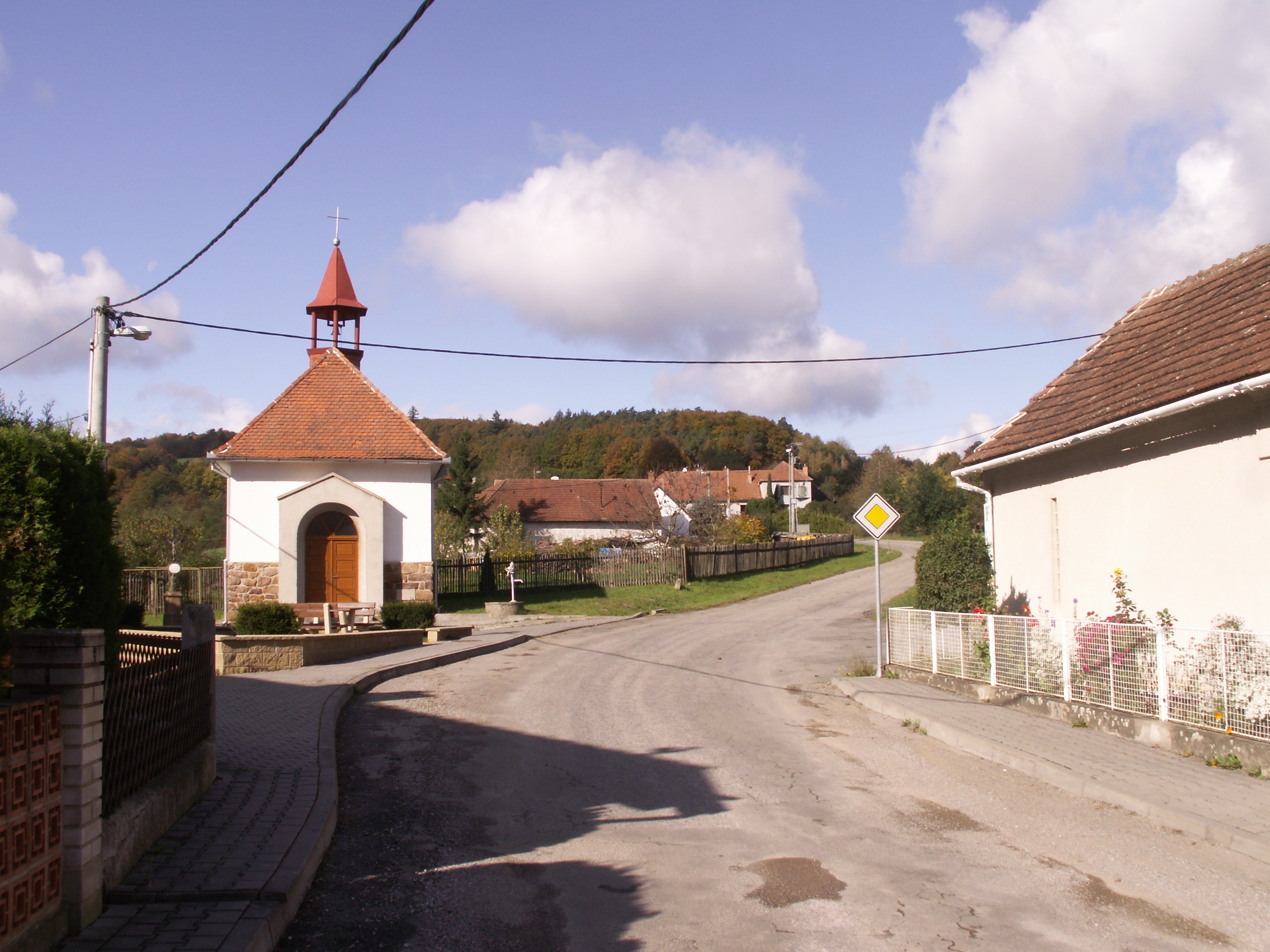 Čížky, okres Brno-venkov